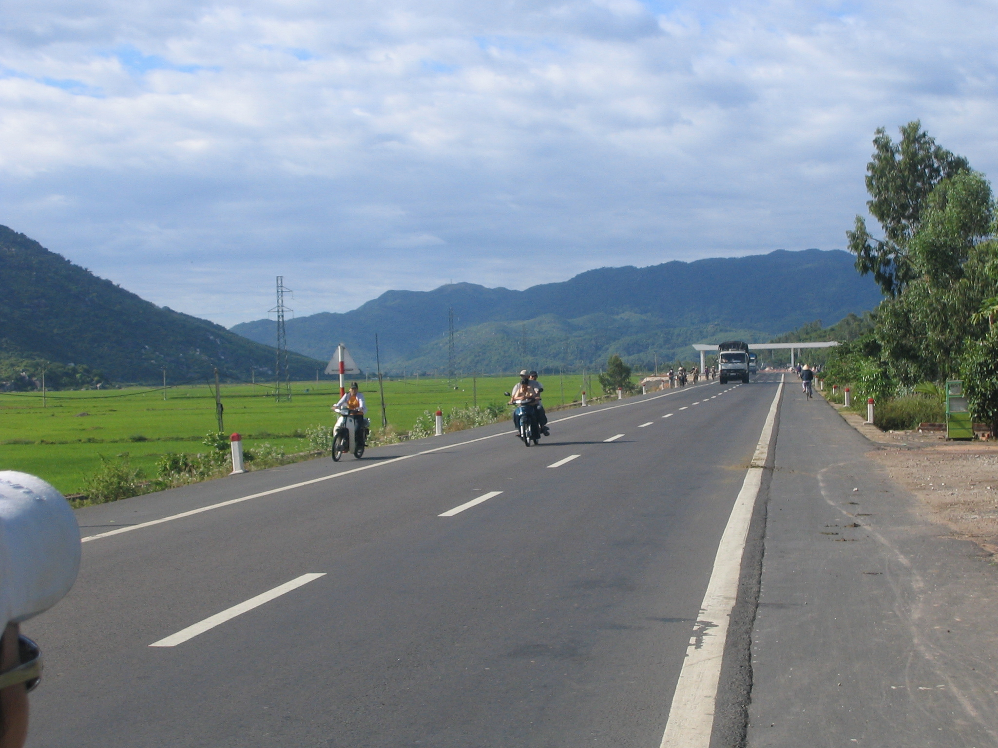 Quốc lộ 1A giữa Phú Yên và Khánh Hòa.